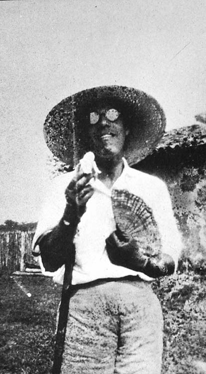 Ridiculous_Bet_in_Teffé, by Mário de Andrade (en/pt)